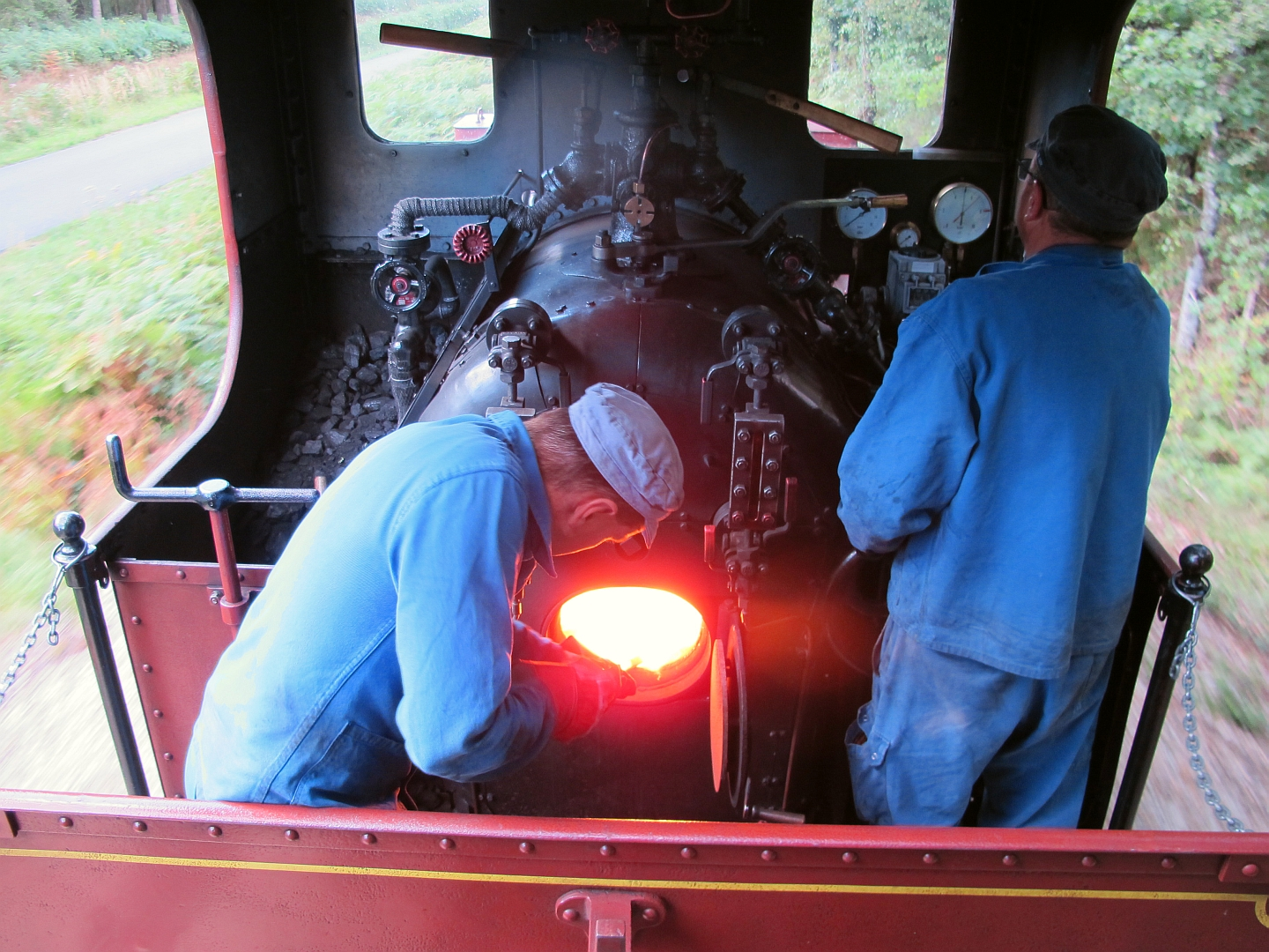 L'équipe de conduite de la locomotive 020 T 11 du Train du Bas-Berry le 23 août 2015.